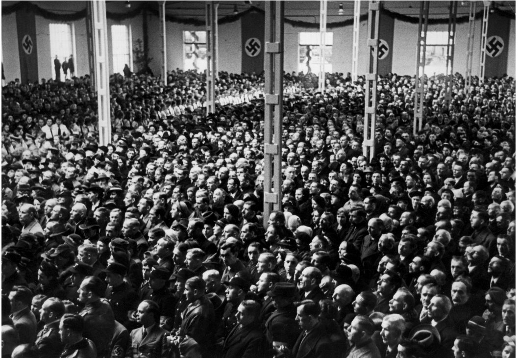 Wiec mniejszości niemieckiej w hali fabrycznej zakładów włókienniczych "Wilanów" w Tomaszowie Mazowieckim